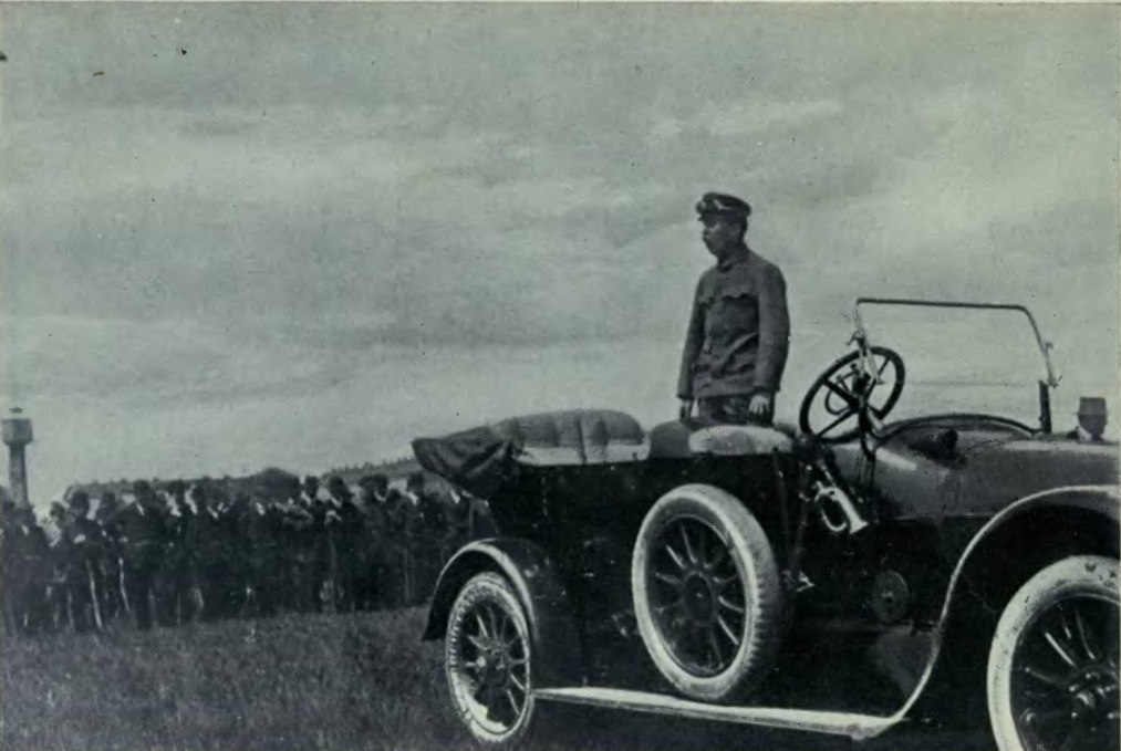 Tibor Szamuely durante un discurso, 1919.